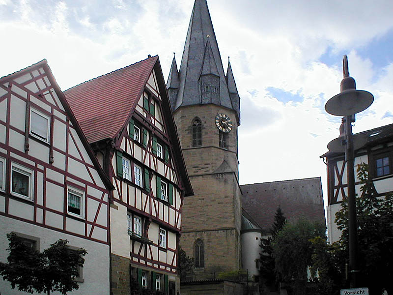 Katholische Stadtkirche in Eppingen, erbaut 1435 auf einem älteren Vorgängerbau